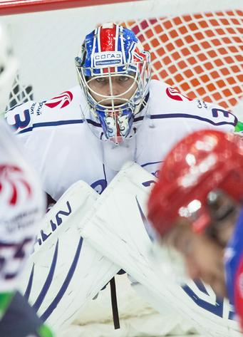 Вратарь новосибирской «Сибири» Сергей Гайдученко во время матча чемпионата КХЛ против московского ЦСКА 28 октября 2012 года.